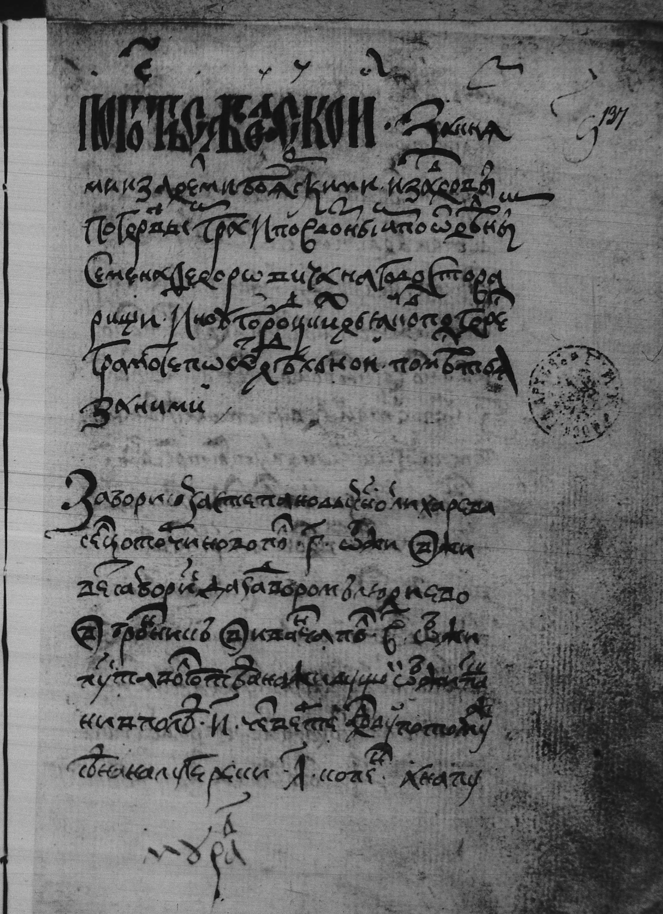 Лист 137 из писцовой книги 1571 года письма Яныша Иванова сына Муравьева и подьячего Кирилко Кстечкова.